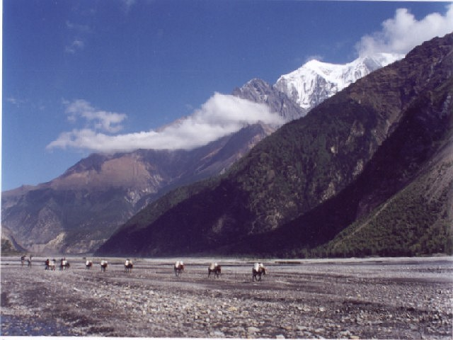 שיירת חמורים בערוץ נהר הקאלי גנדאקי, נפאל. ברקע הר האנפורנה. תמונה שצילמתי בעצמי.